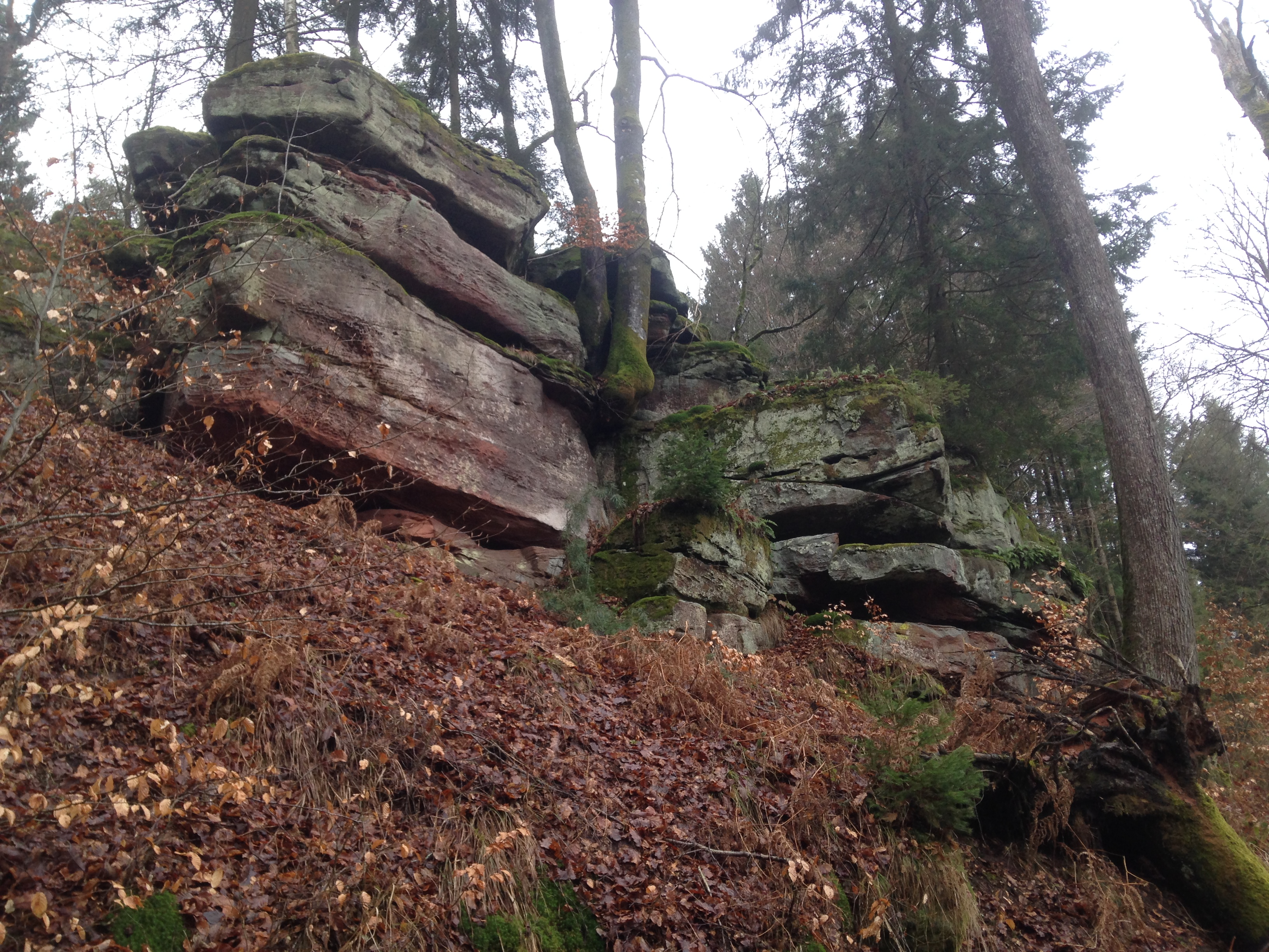 Felsen der ehemaligen Heidelsburg bei Waldfischbach-Burgalben